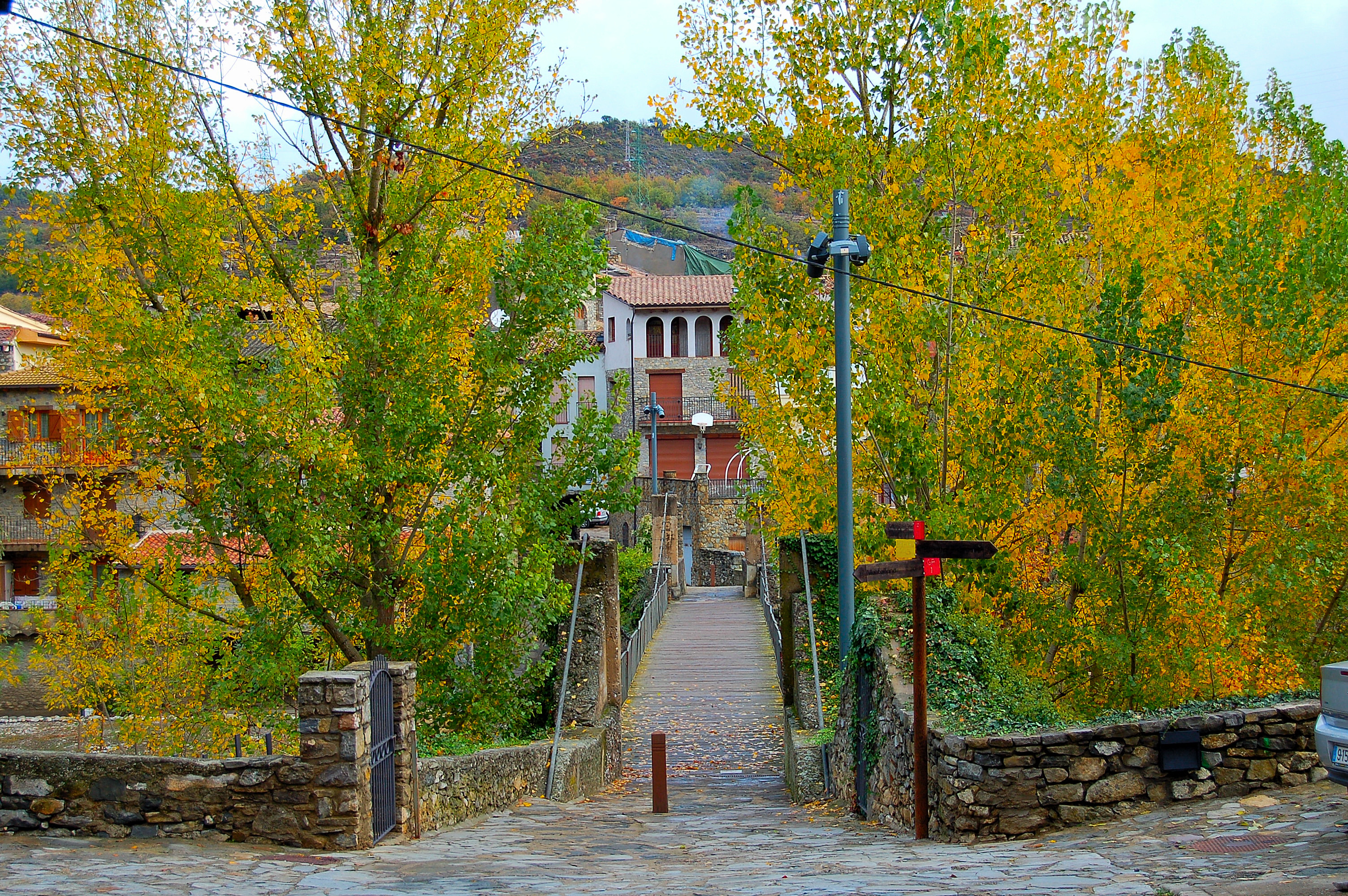 Puente sobre el Rio Noguera Ribagorzana en Puente de Montañana